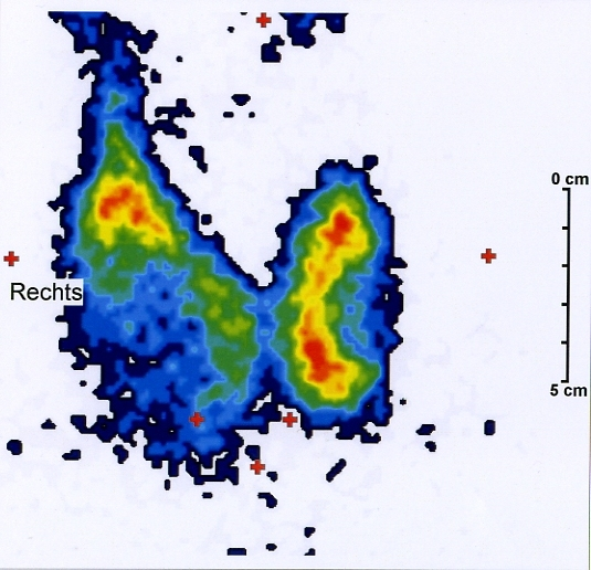 Schilddrüsenszintigramm 10 min. p.i. nach 70 MBq 99mTc-Pertechnetat. Großer kalter Knoten caudal im rechten Schilddrüsenlappen, kleinerer kalter Knoten lateral im linken Schilddrüsenlappen.